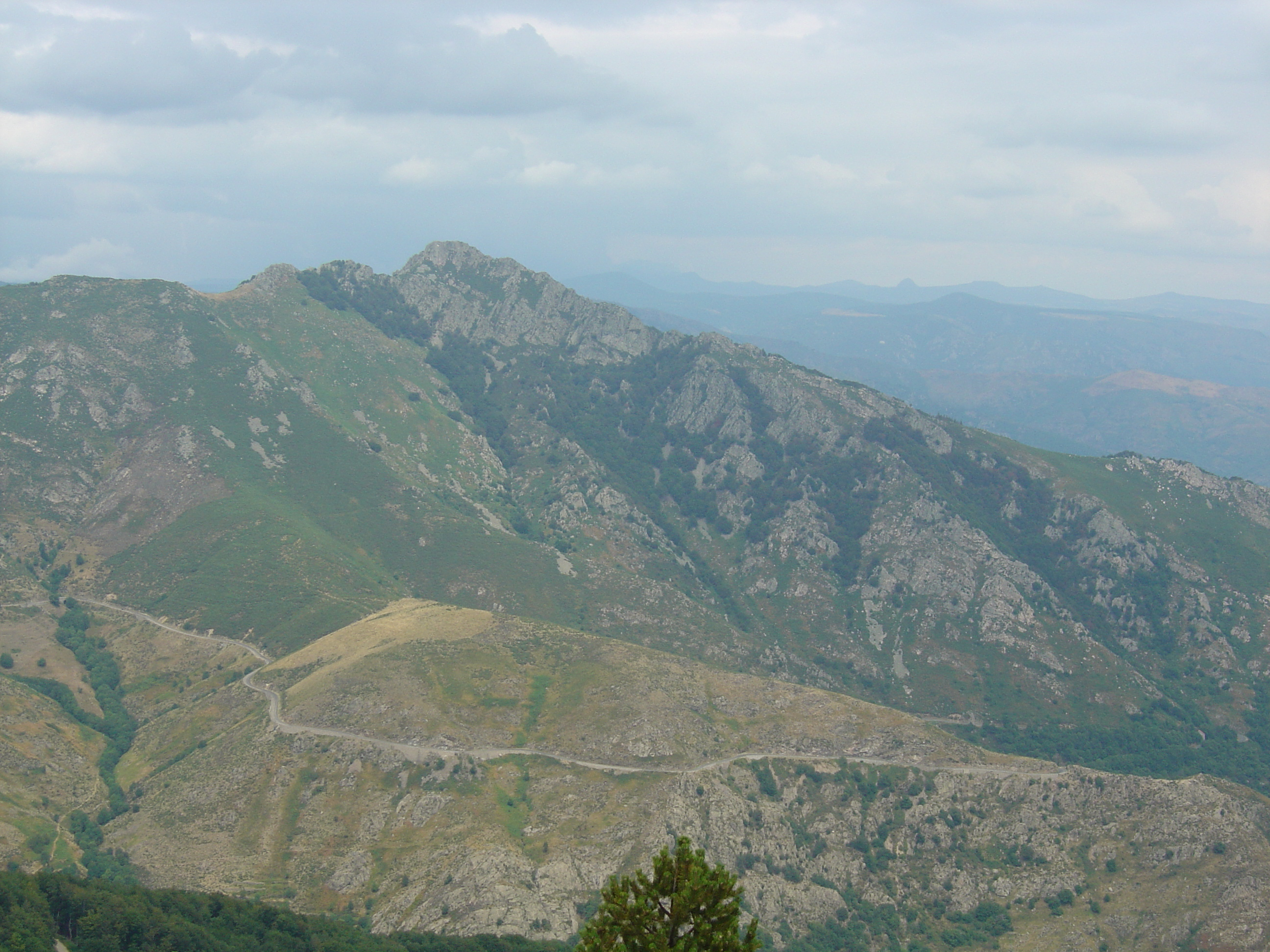 Vue sur le rocher d'Abraham (1498m) et les Monts du Vivarais (Gerbier de Jonc...) depuis le sommet Méjan